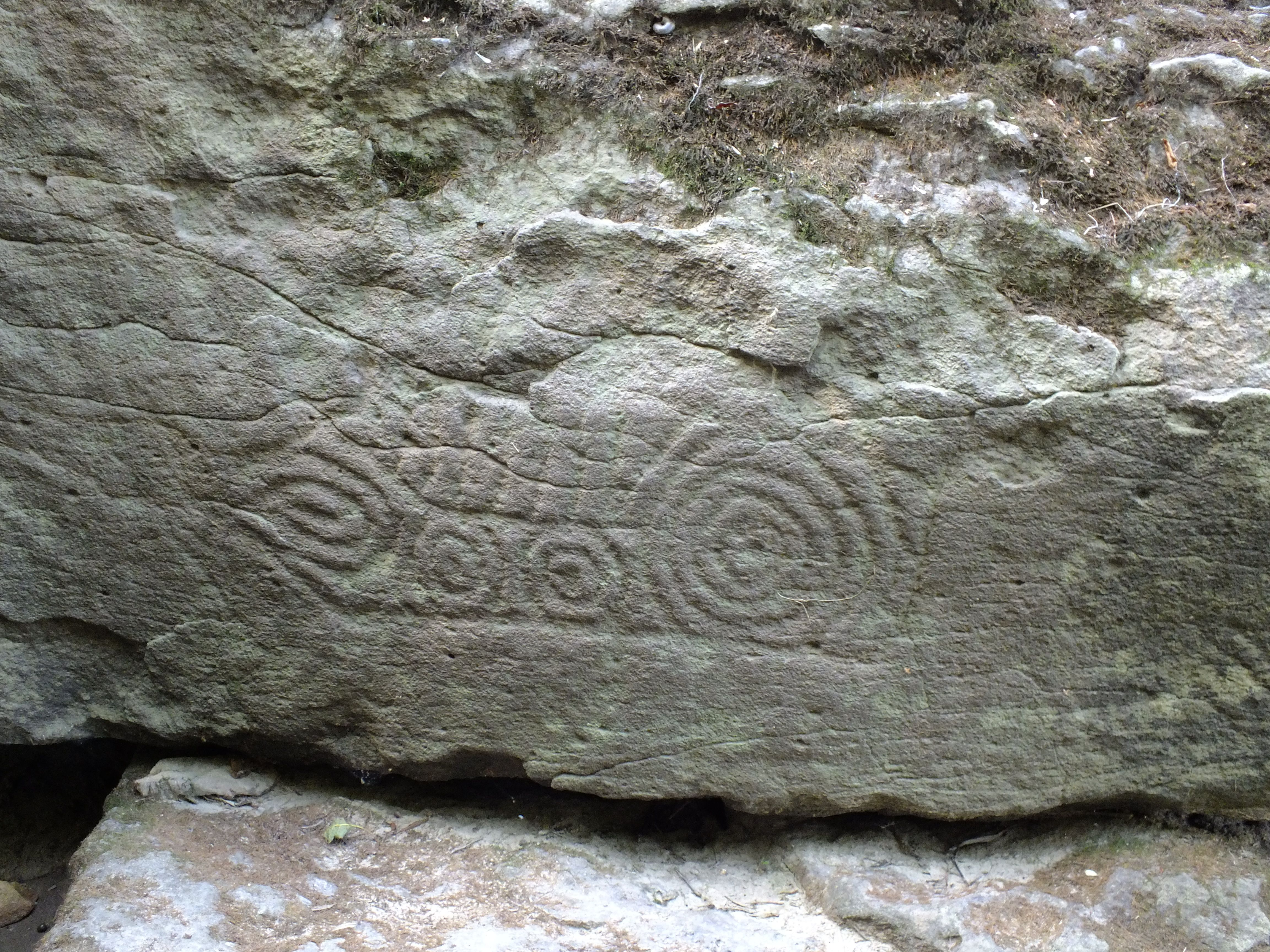 Petroglif of Sikachi-Alyan